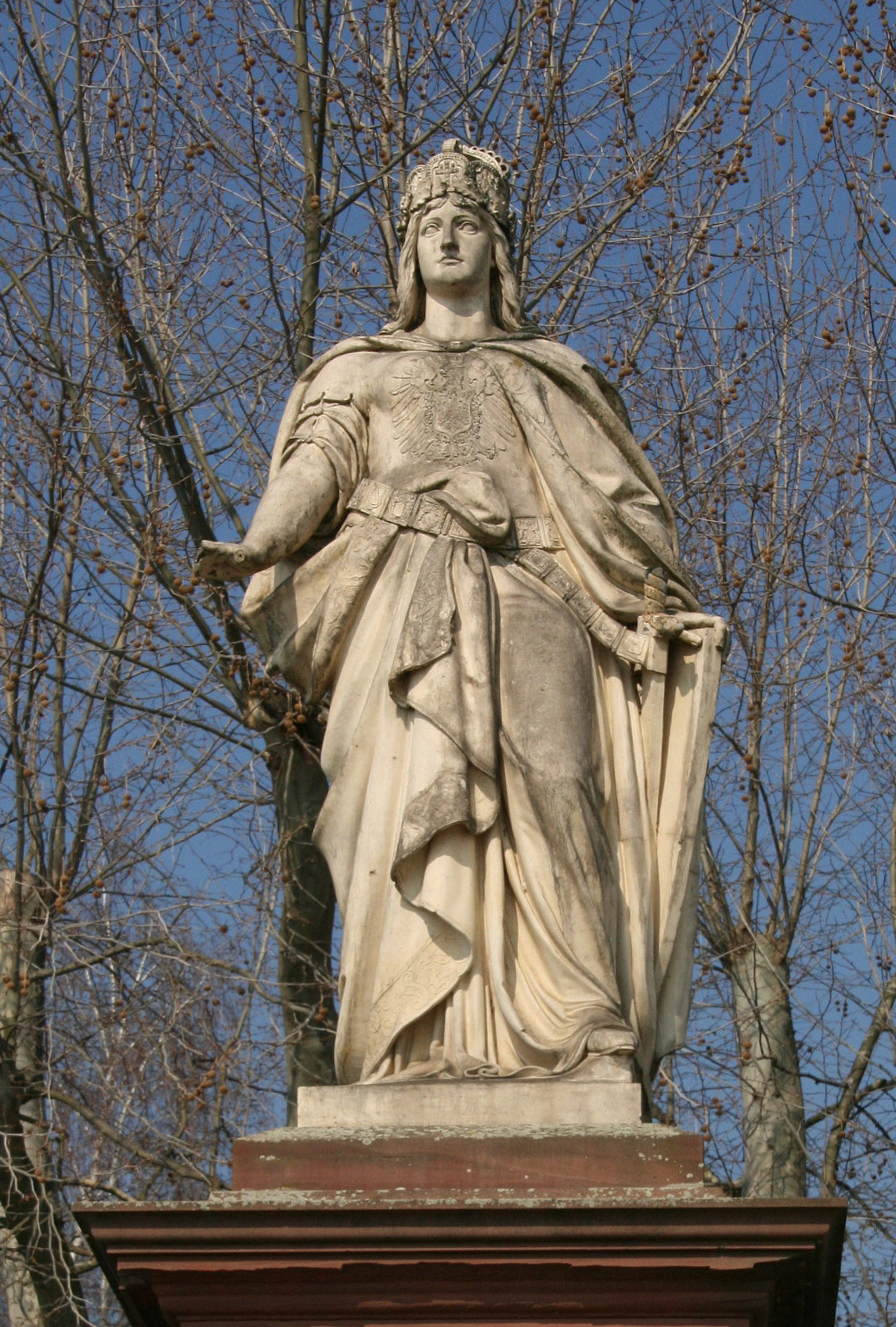 "Eltviller Germania", Kriegerdenkmal für die Gefallenen des Deutsch-Französischen Krieges von 1870/71. Errichtet 1882 nach Plänen des Bildhauers Alexander Calandrelli. Eltville am Rhein